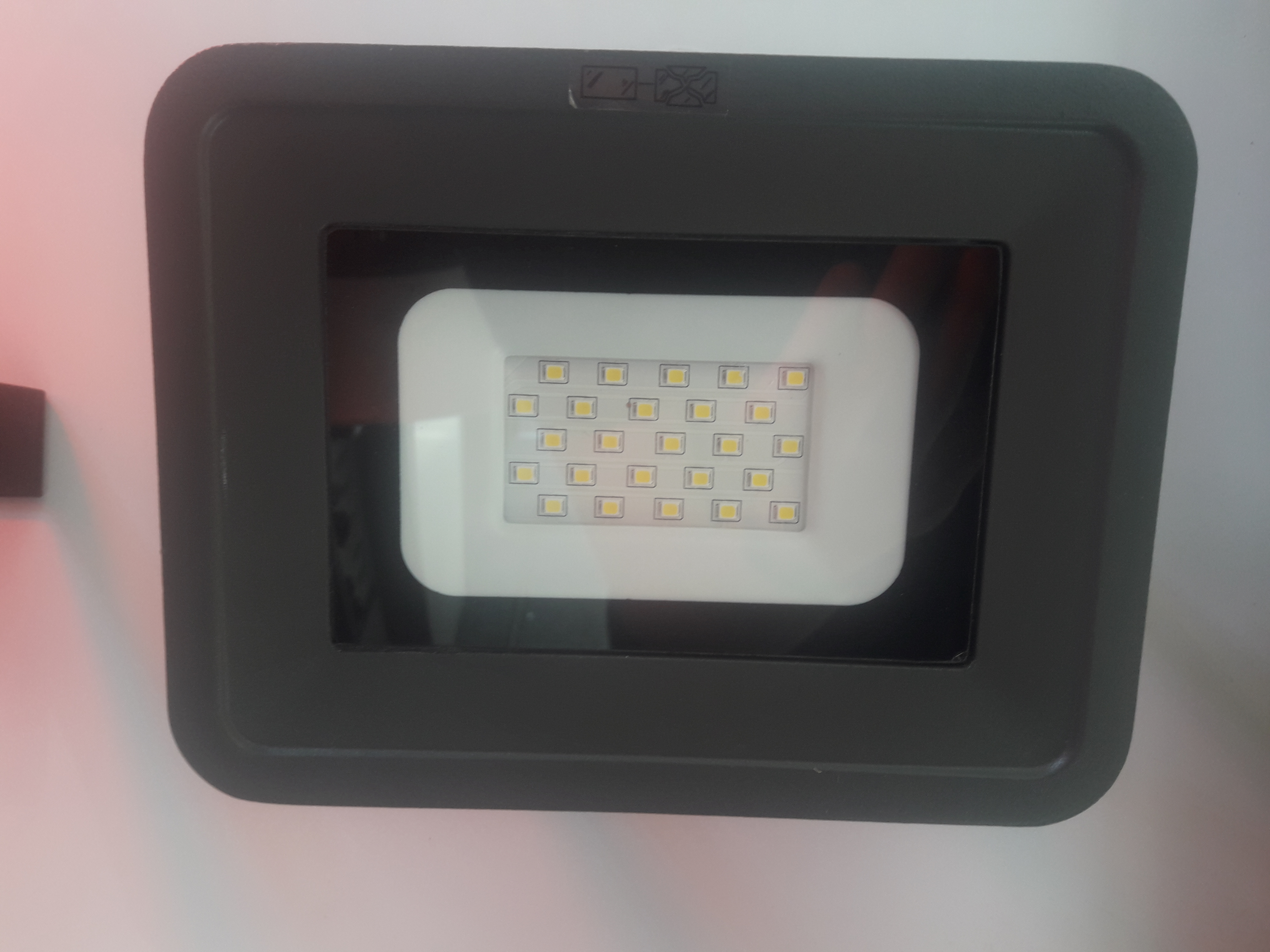 Nowoczesny halogen LED oparty o źródła SMD